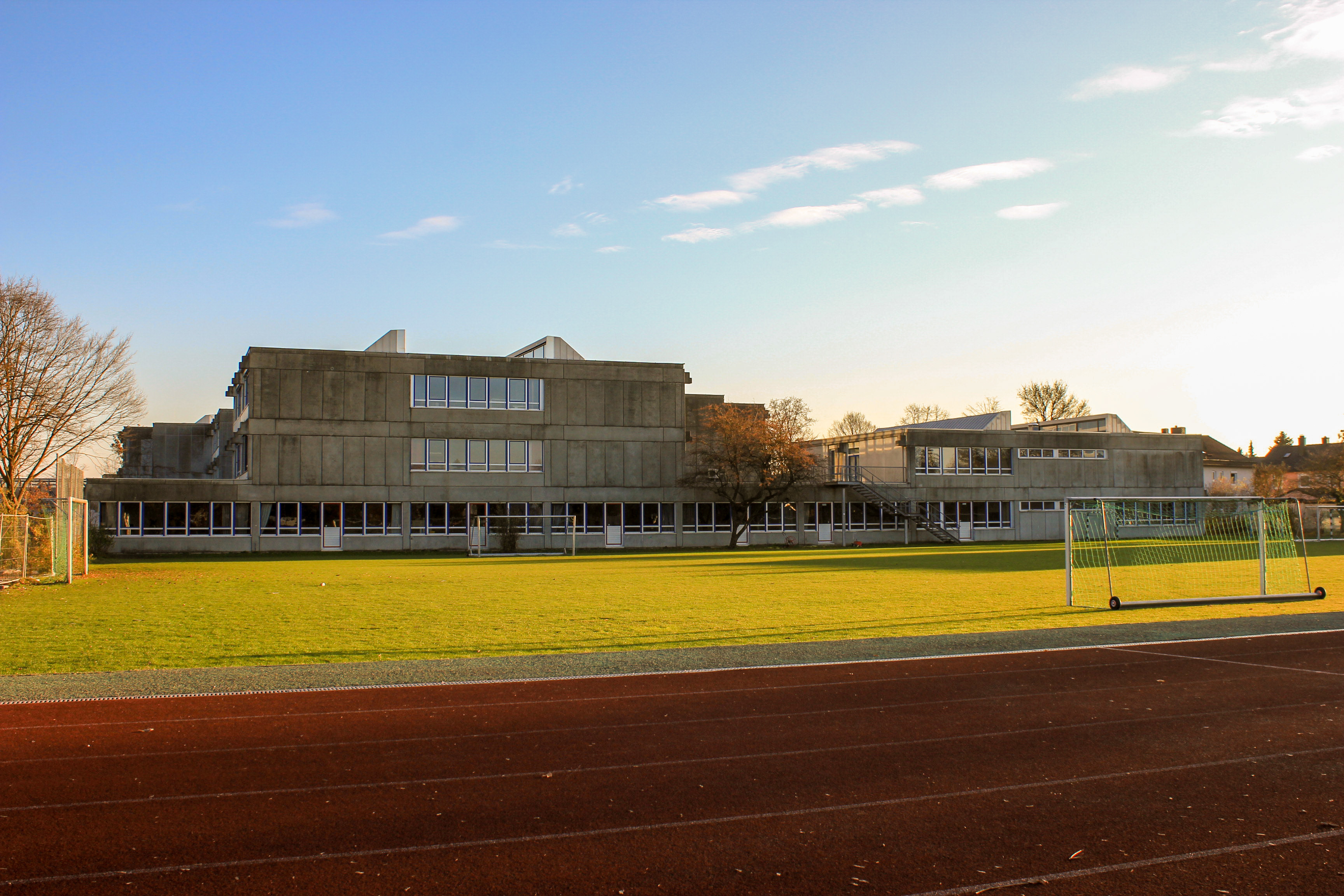 Das Foto zeigt die Nordseite des Gymnasiums Olching mit dem Sportplatz im Vordergrund.